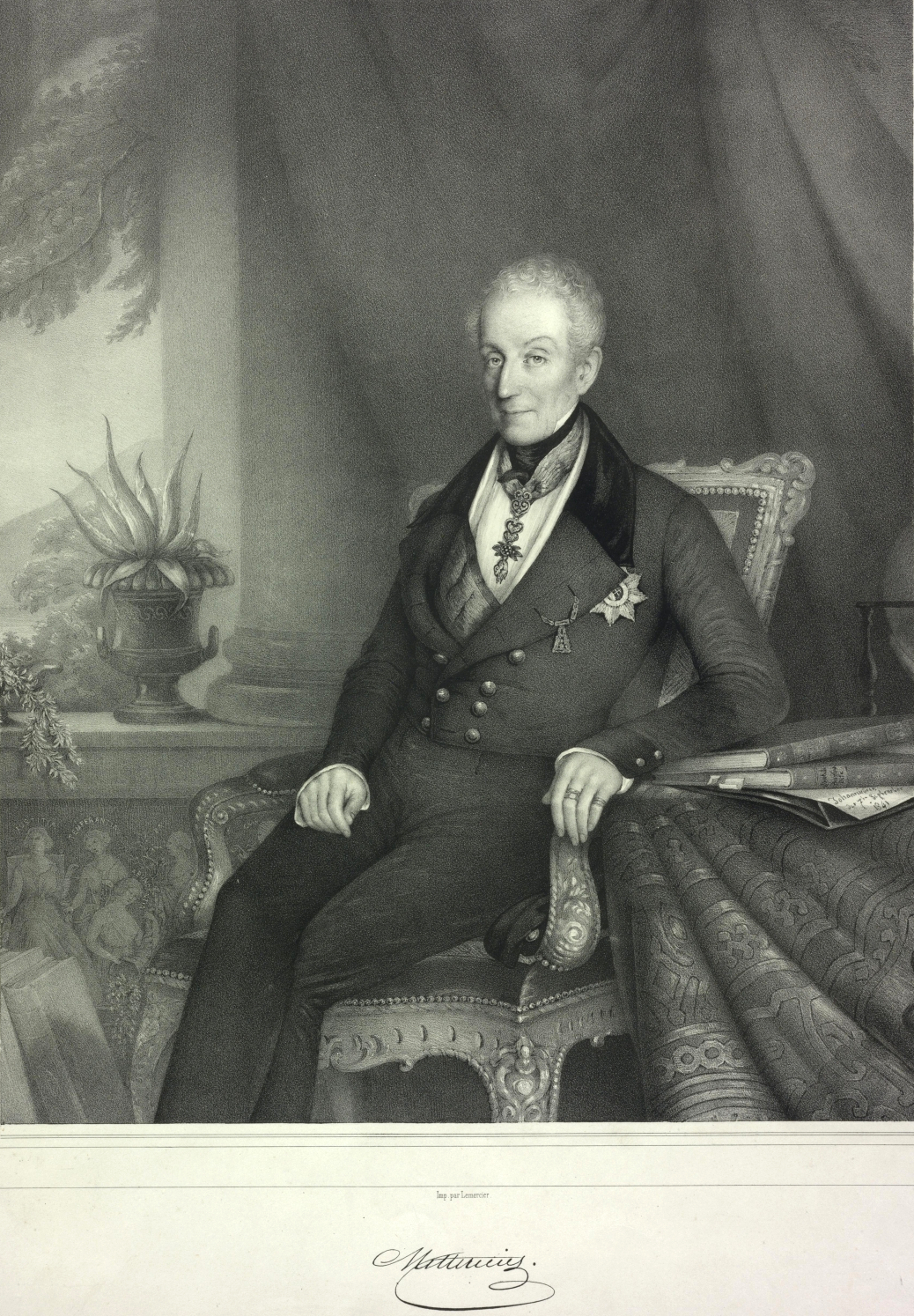 Klemens Wenzel Lothar Fürst von Metternich-Winneburg (1773 - 1859) Lithographie von Franz Heister nach Gemälde von Eduard Heuss